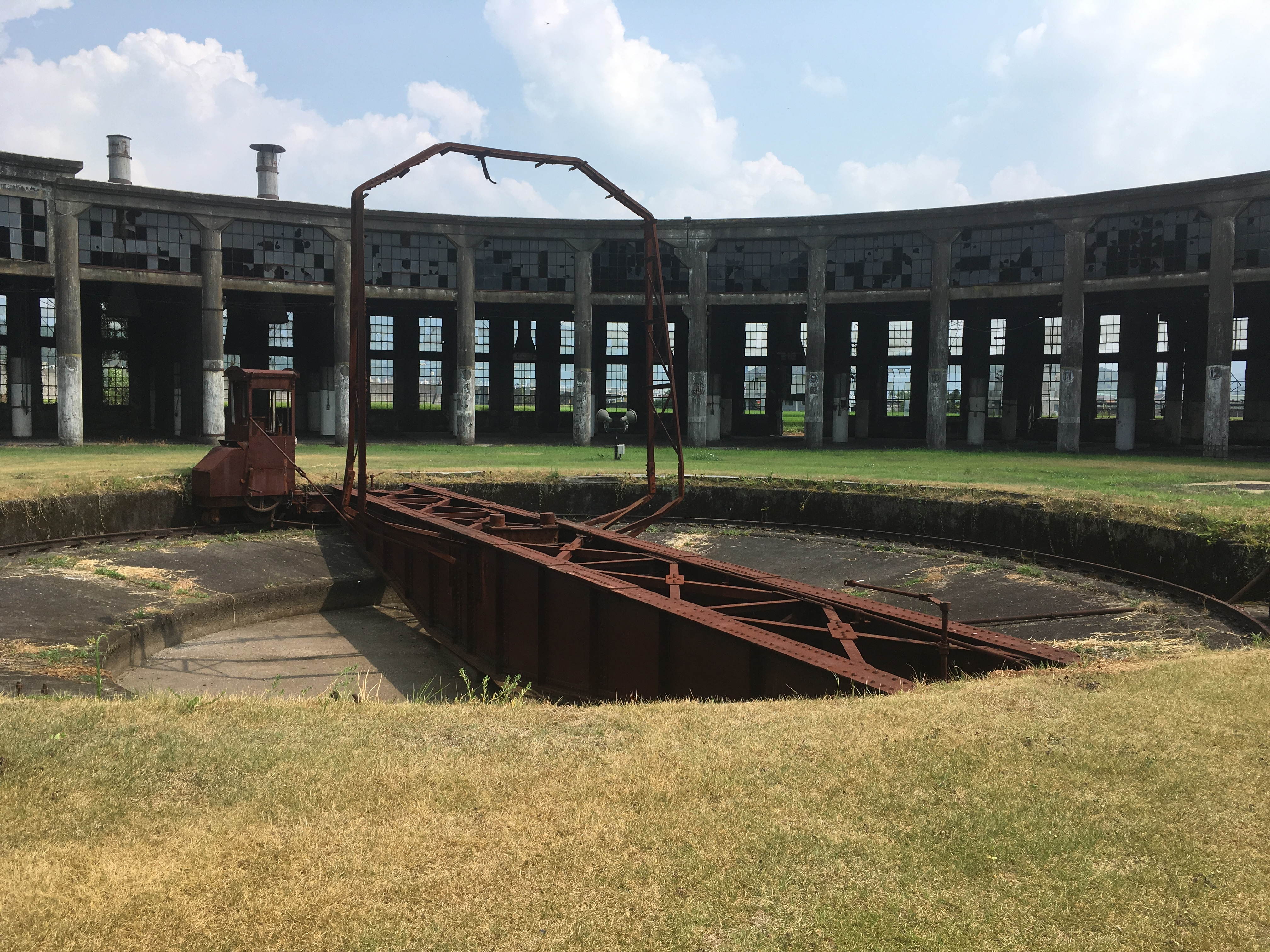 豊後森円形機関車庫